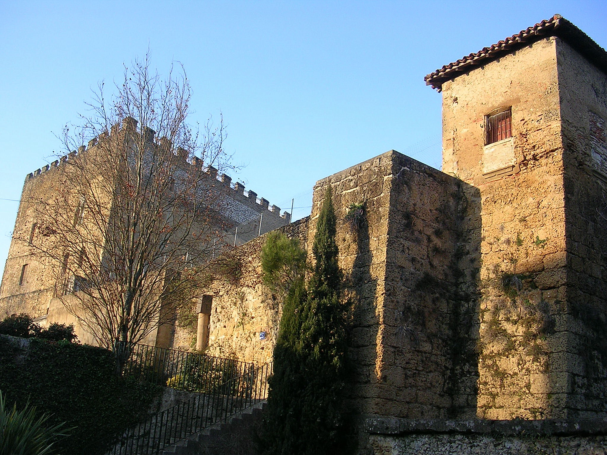 Donjon Lacataye et tour des remparts à Mont-de-Marsan. Photo prise par Jibi44